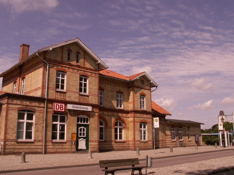 Sønder Brarup station.